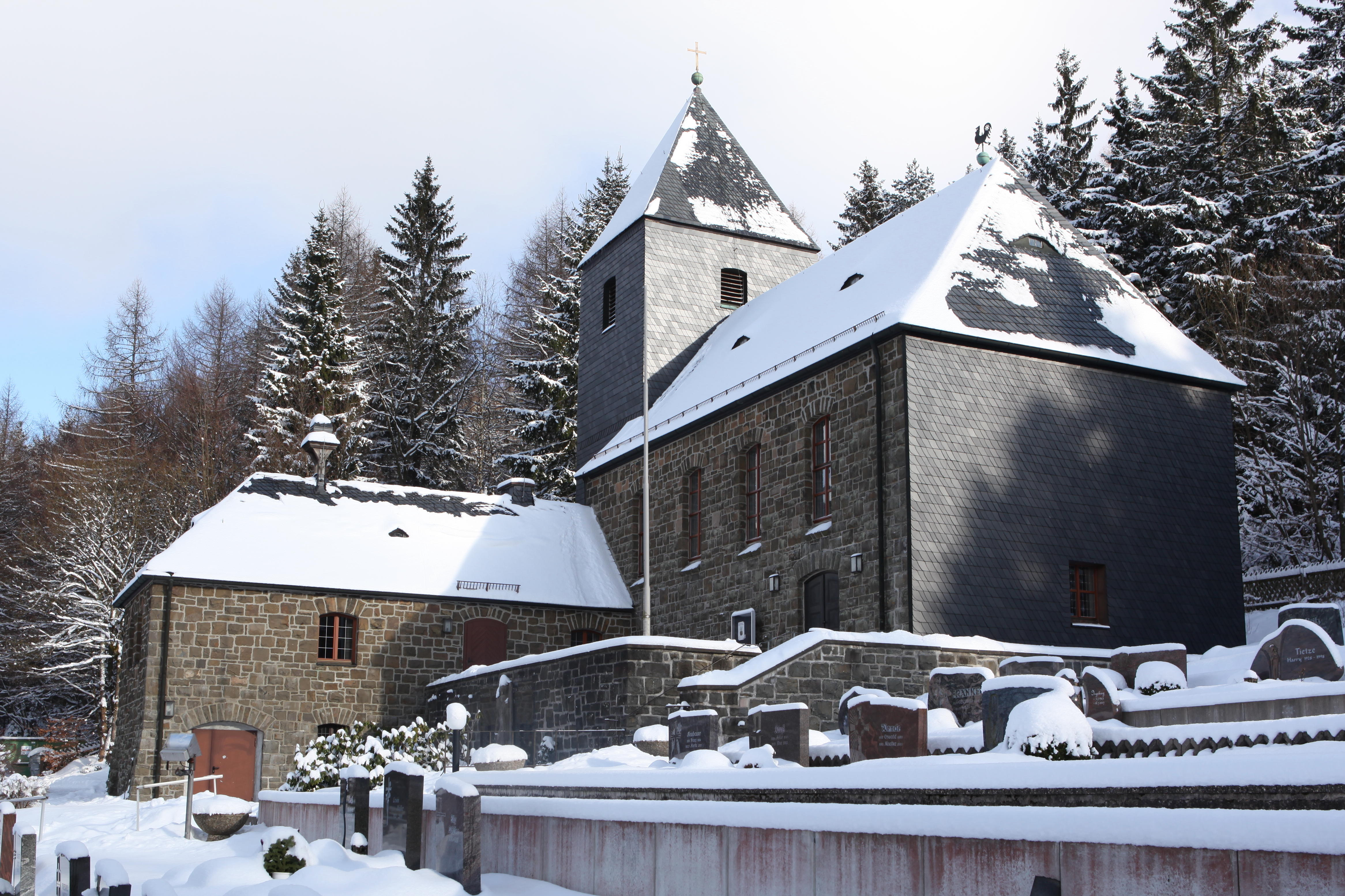 evangelisch-lutherische Auferstehungskirche in Kleintettau (Architekt Reinhard Claaßen), OT von Tettau, Landkreis Kronach